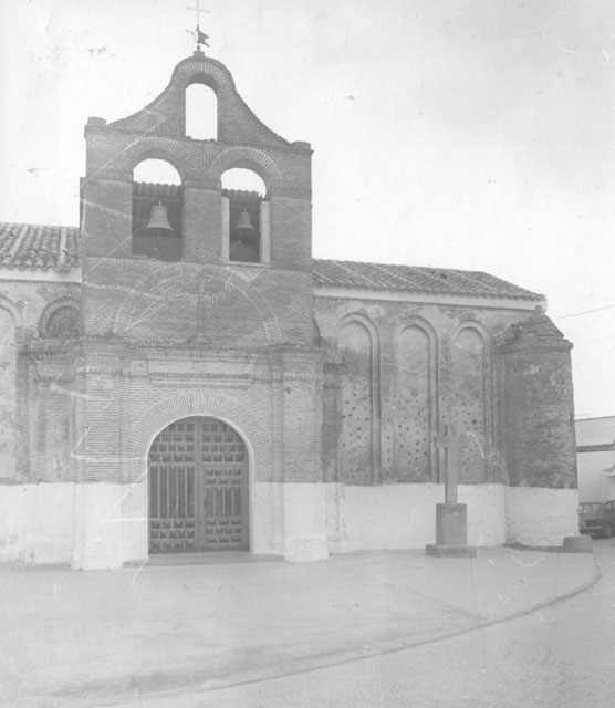 Iglesia parroquial de San Juan Degollado - Cervillego de la Cruz (Valladolid) - Álbum 200 x 140 - Fotografía. Papel 90 x 100 B/N